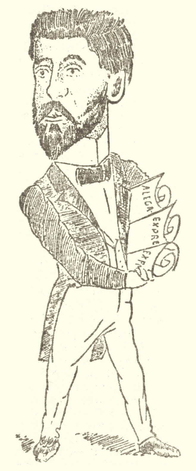 Autocaricatura del escritor uruguayo José Alonso y Trelles (1857 - 1924).